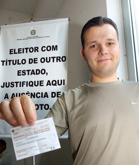 Elector justificando su ausencia para una votación en Brasil